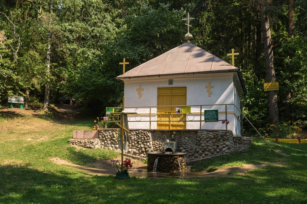 Чарневічы. Крыніца Св. Іаана Хрысціцеля